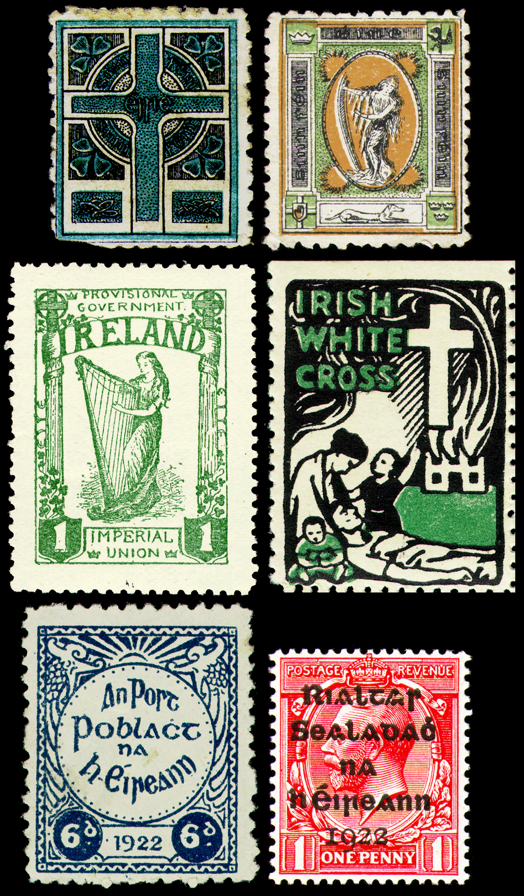 Марки-"предшественники" ирландских сепаратистов (1901-1922) и первая официальная почтовая марка независимой Ирландии, 1922 год.